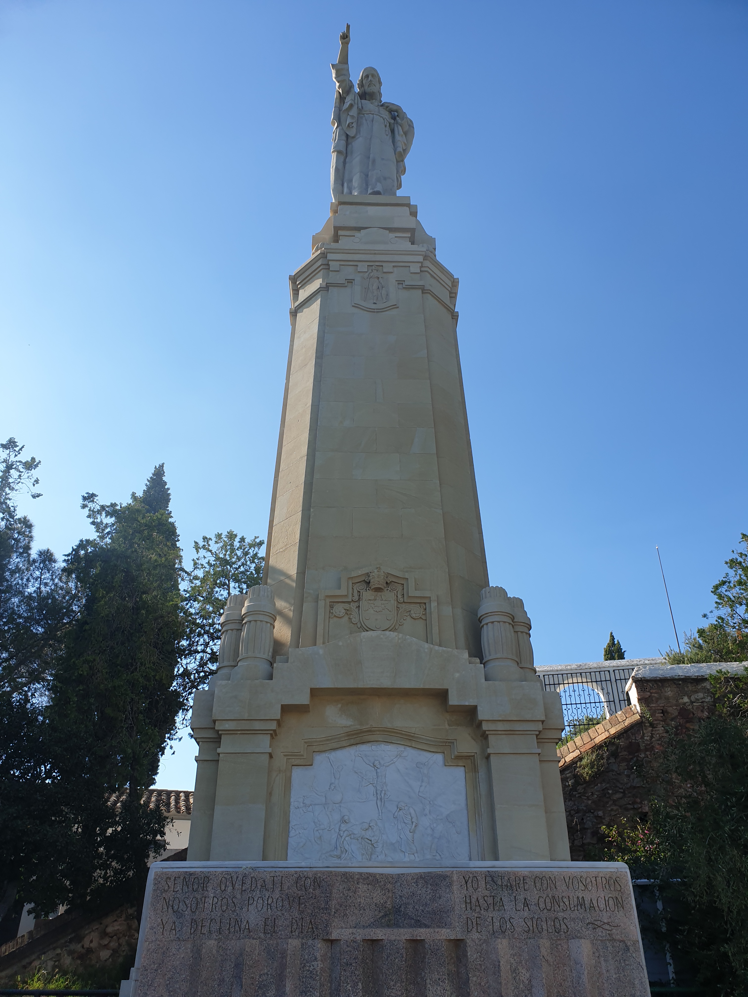 Las Ermitas Córdoba